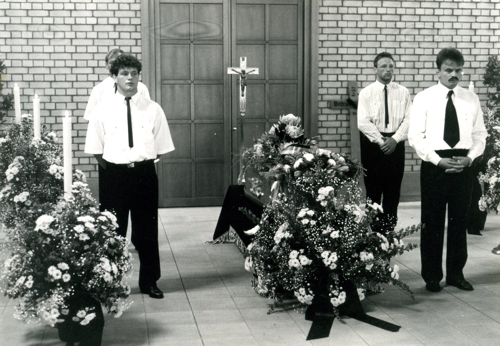 Gerhard Sattel (vorne rechts) - Totenwache für Ringer-Legende Wilfried Dietrich (1992)